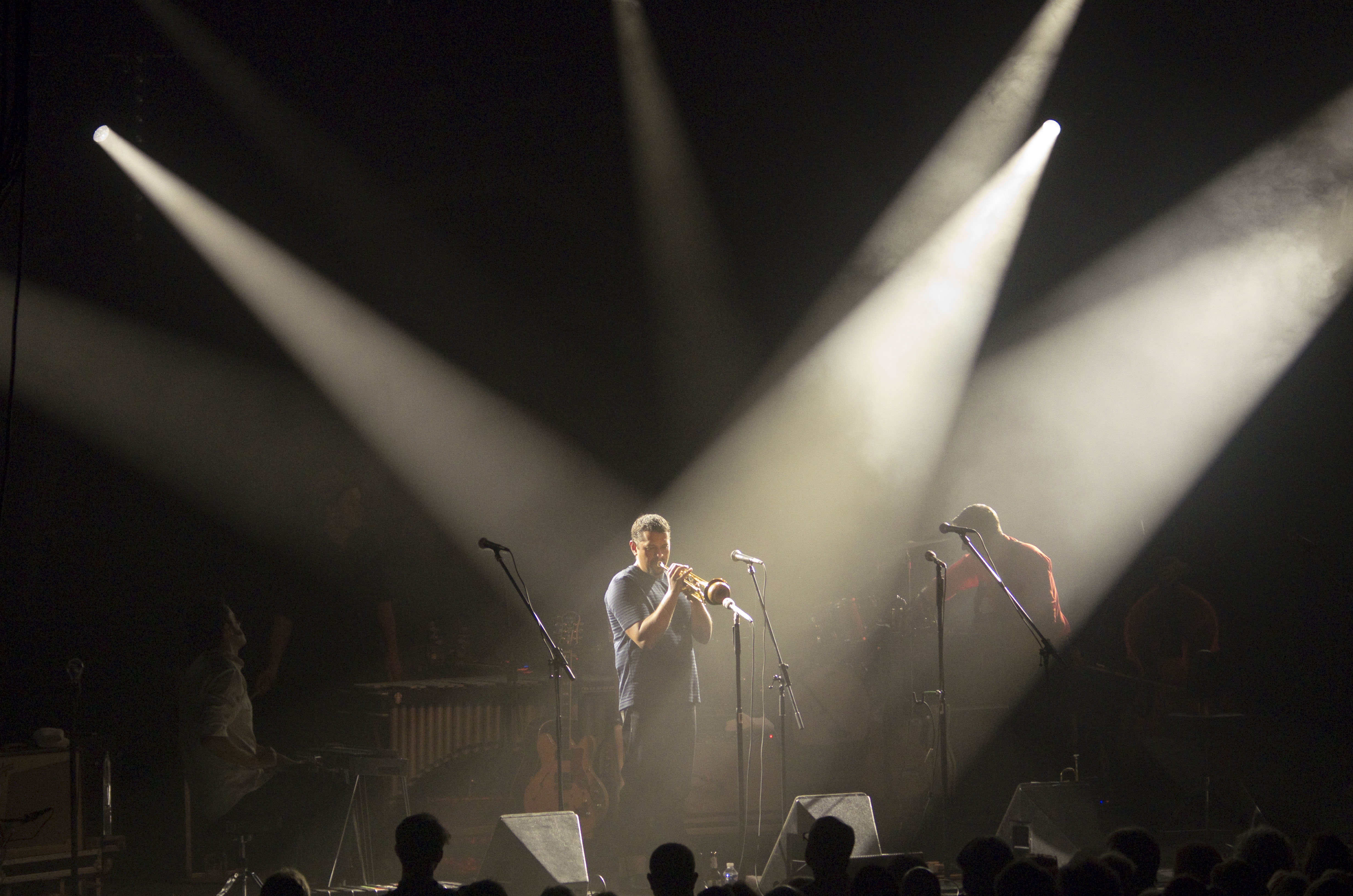 Das Zelt-Musik-Festival 2016 in Freiburg im Breisgau 13.07.2016 Calexico